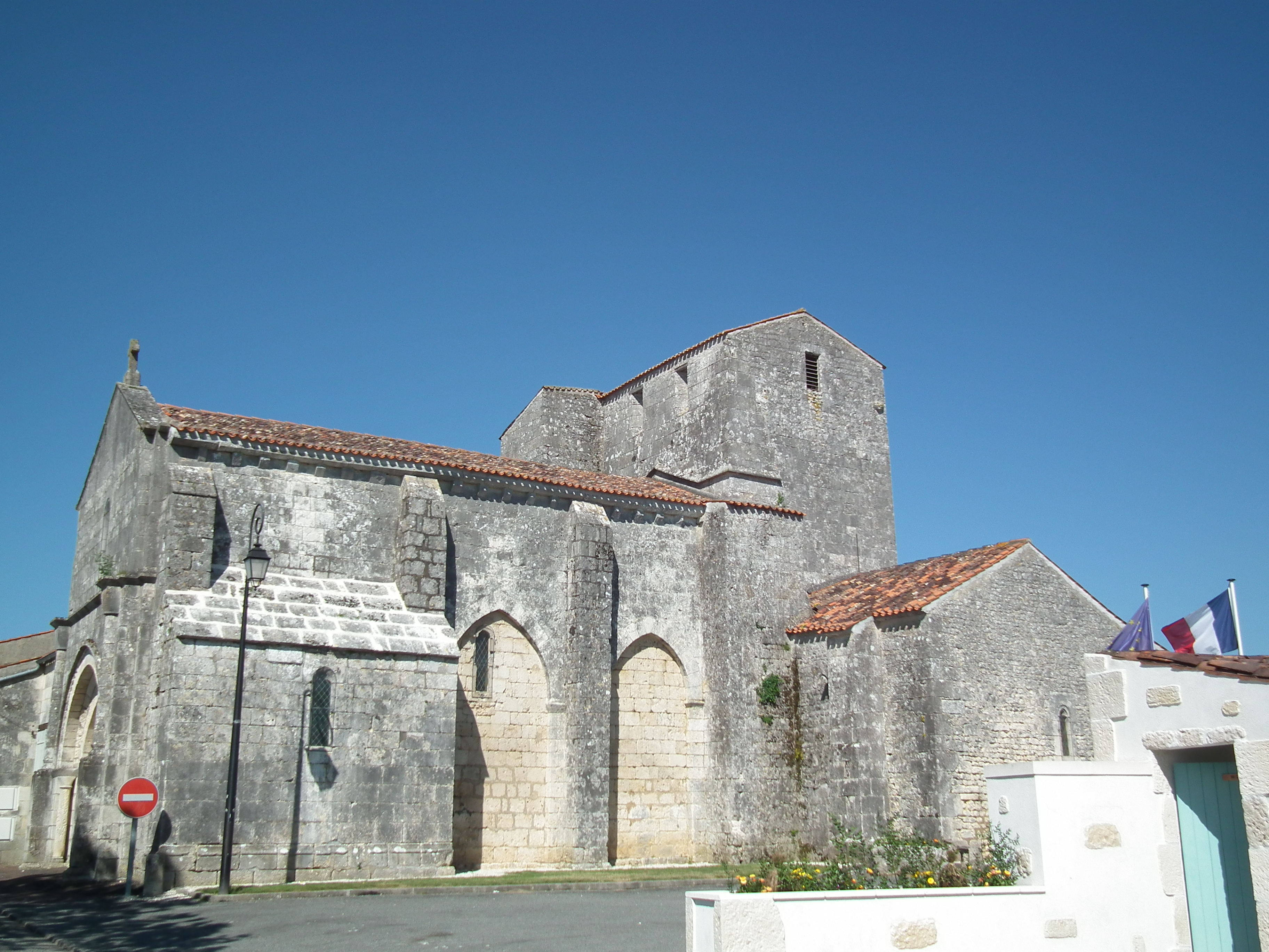 Eglise de Soulignonne